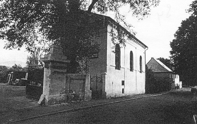 Synagoga v Jirkově, okres Chomutov, Ústecký kraj.